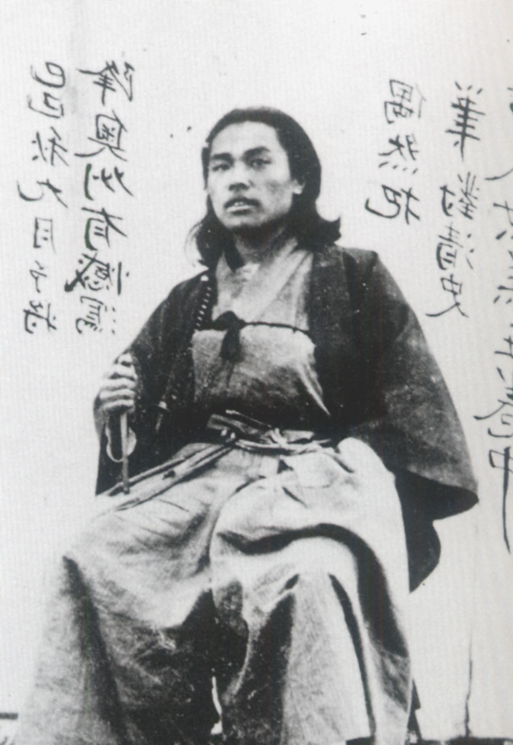 高松太郎 長崎にて撮影された写真。撮影者はおそらく上野彦馬。